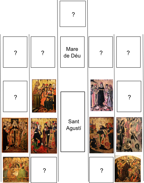 Estructura retaule sant Agustí (Huguet-Vergós) s.XV